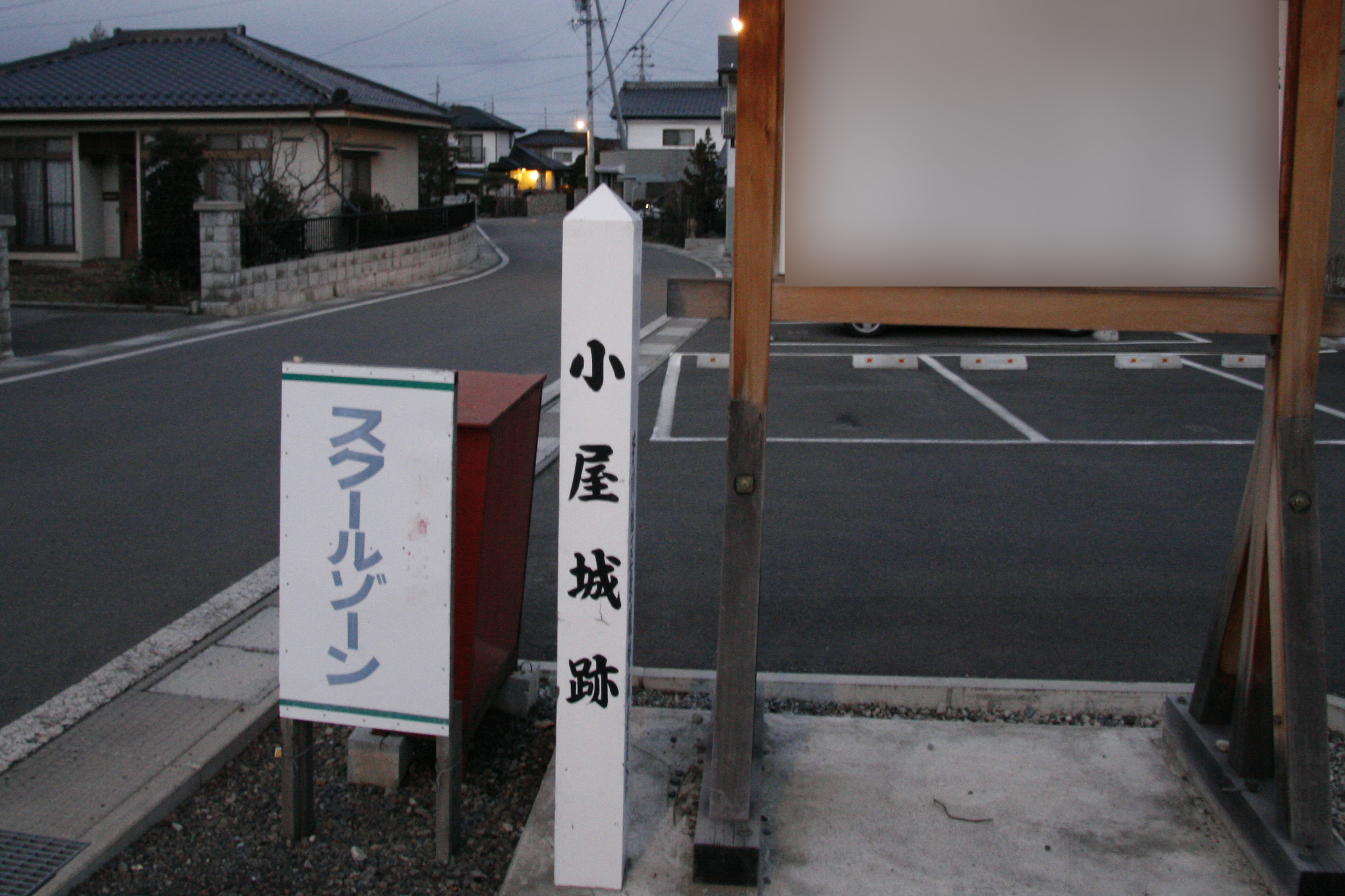 村井城（小屋城跡）の標柱